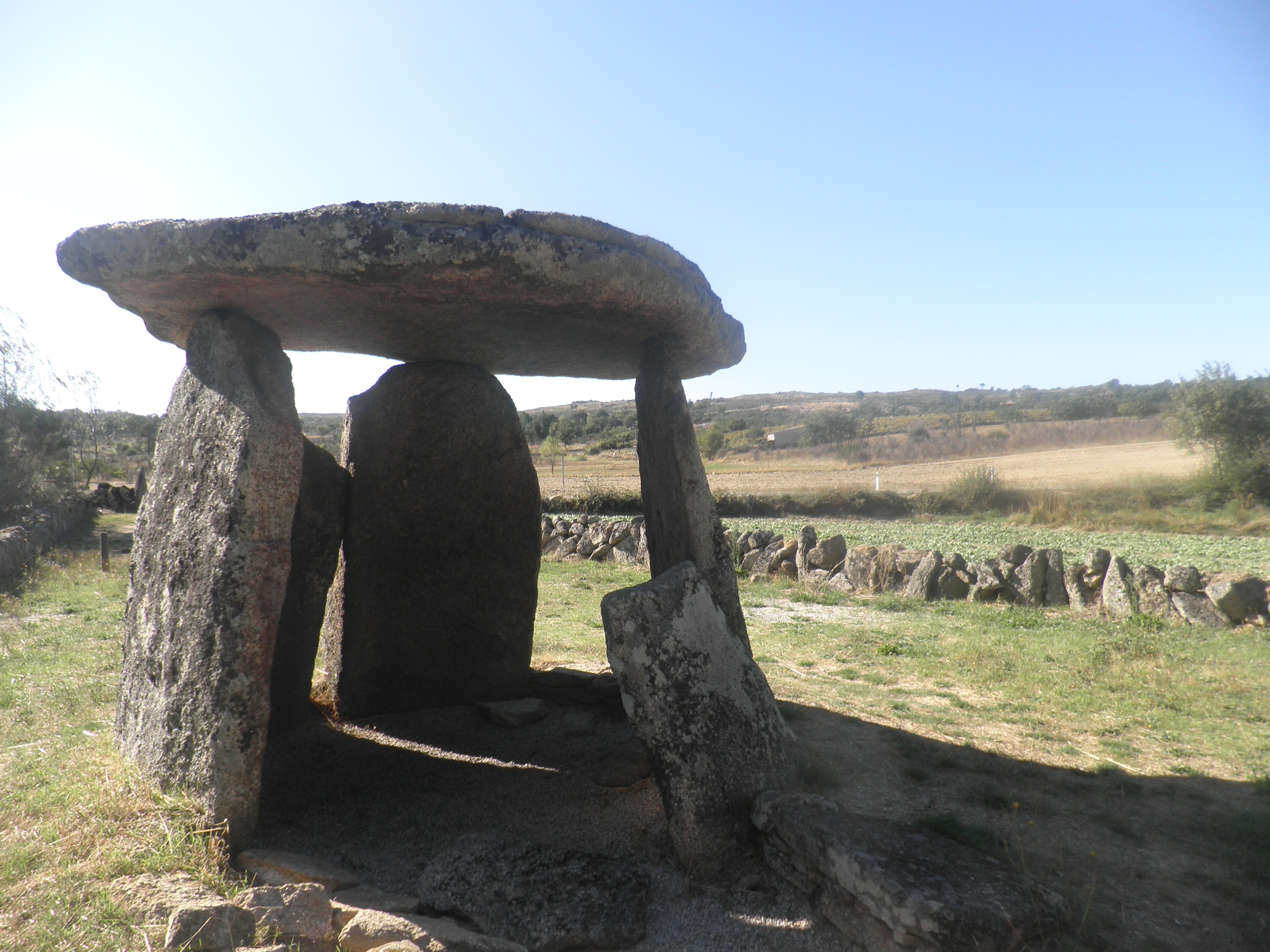 Guarda, lugar da Tapada da Anta. This file was uploaded for Wiki Loves Monuments in Portugal with the unique identifier 72362.